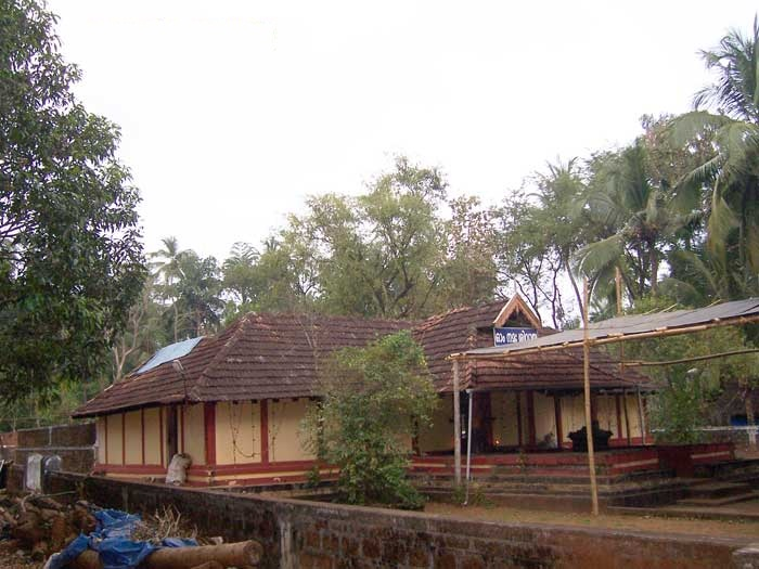 ചെറുവത്തൂർ മഹാദേവക്ഷേത്രം, കുന്നംകുളം